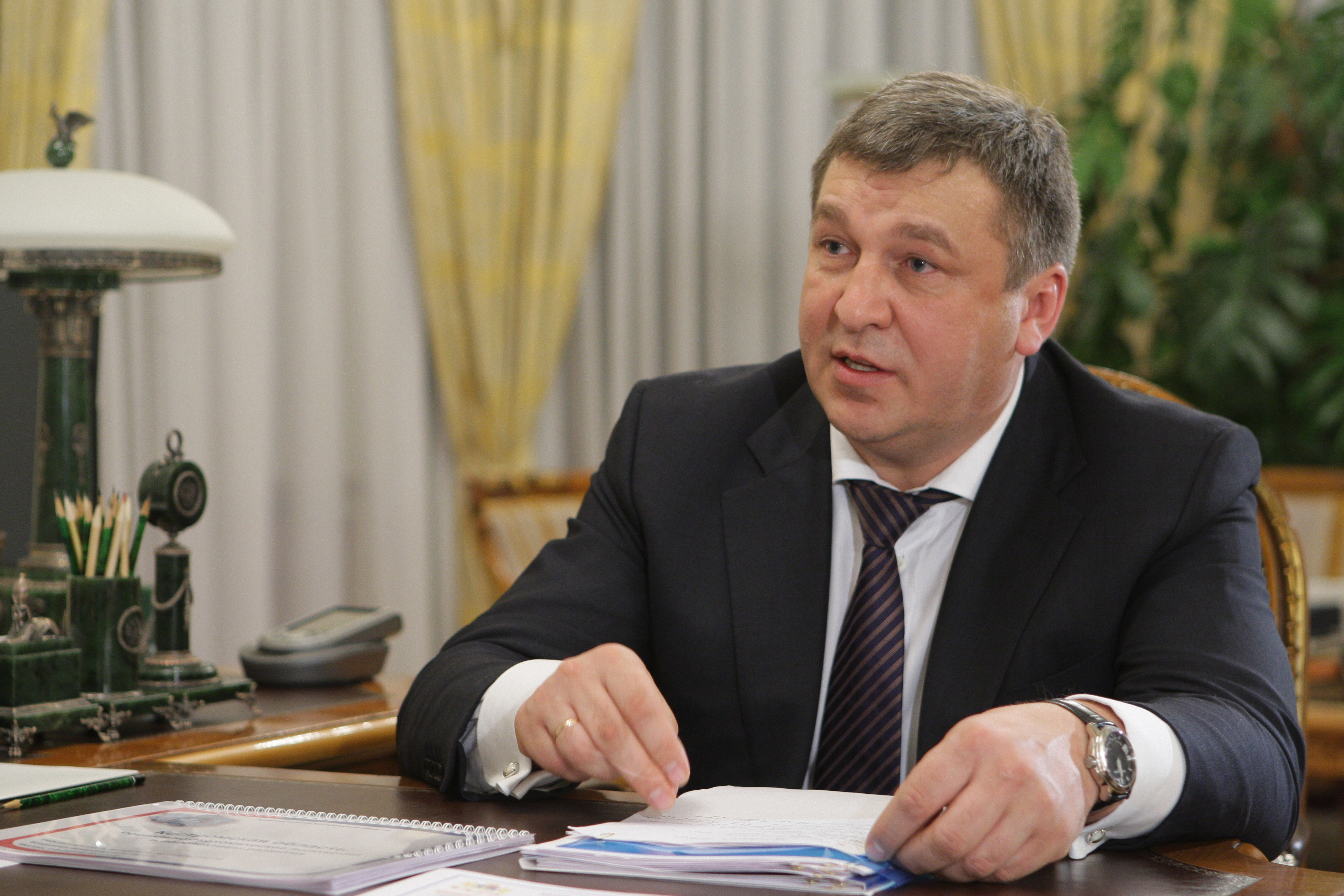 Губернатор Костромской области И. Н. Слюняевым на рабочей встрече с Председателем Правительства Российской Федерации В. В. Путиным